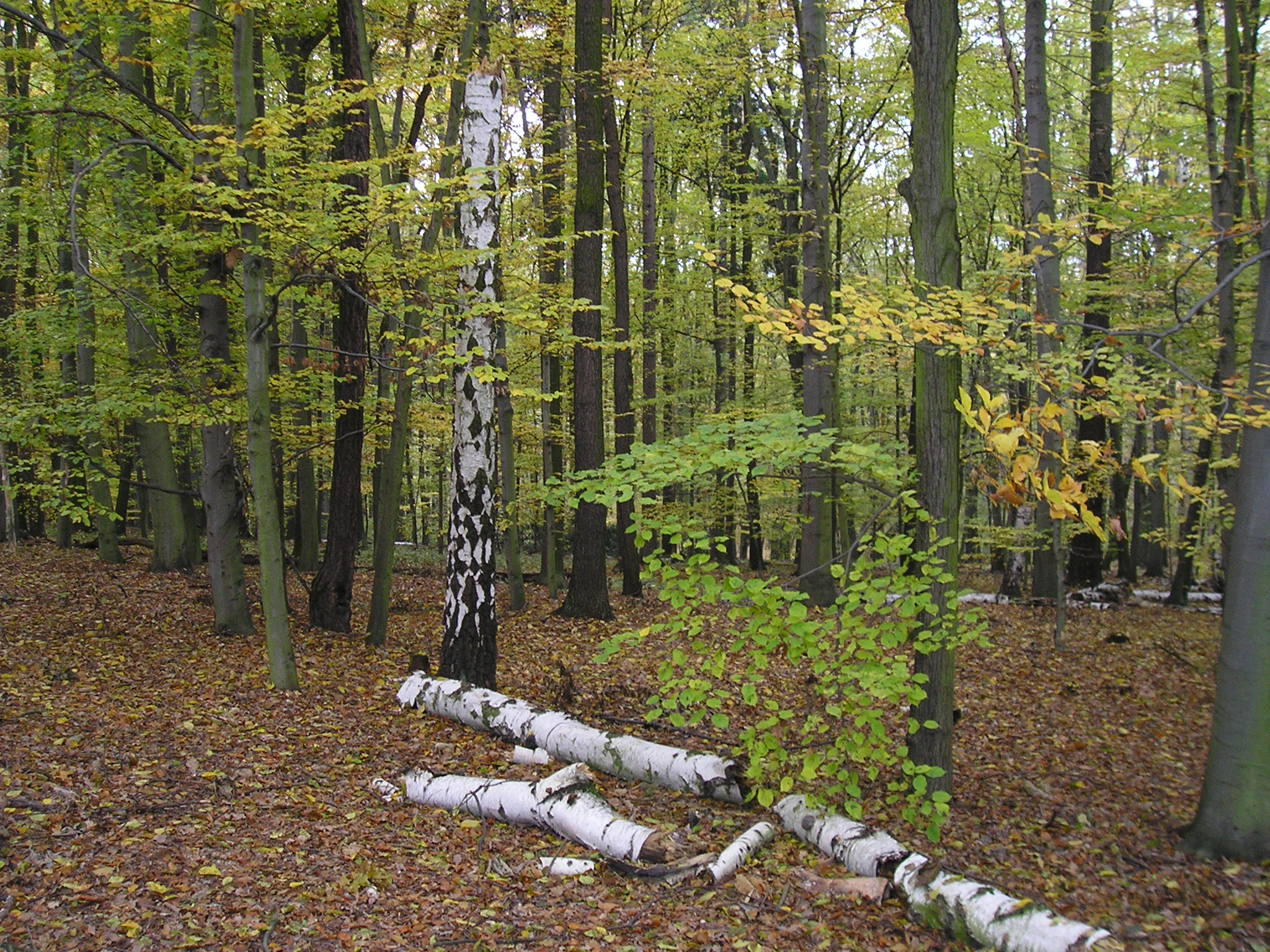 Mladší dubohabrový les v jihozápadní části přirodní rezervace. V popředí dominuje padlý kmen břízy bělokoré (Betula pendula). Půda s největší pravděpodobností kambizem typická.